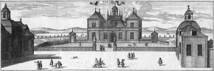 Säby gård på ett kopparstick från 1600-talet